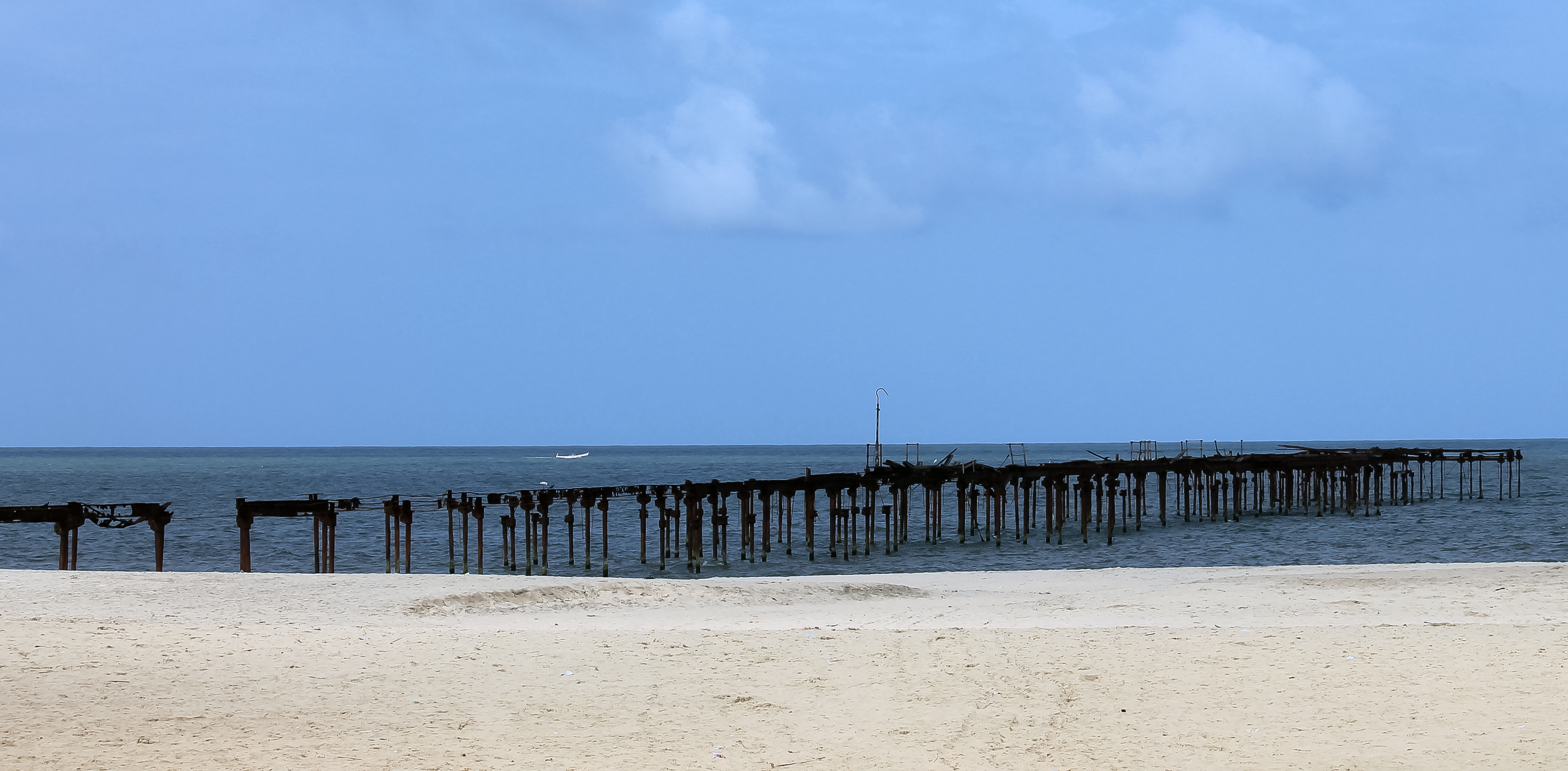 ആലപ്പുഴയിലെ കടൽപ്പാലം.